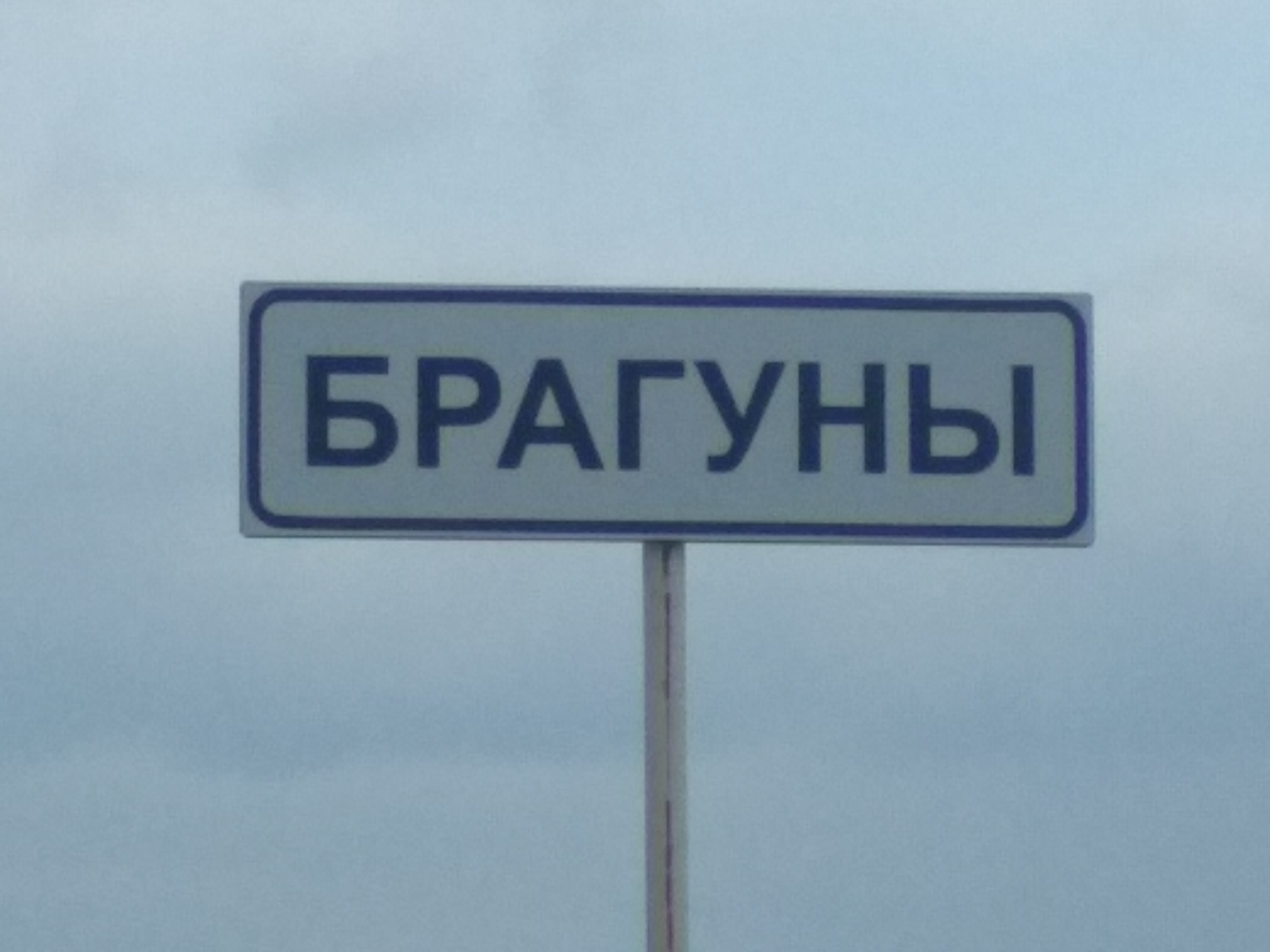 Нохчийн: Борг1анен хьаьрк